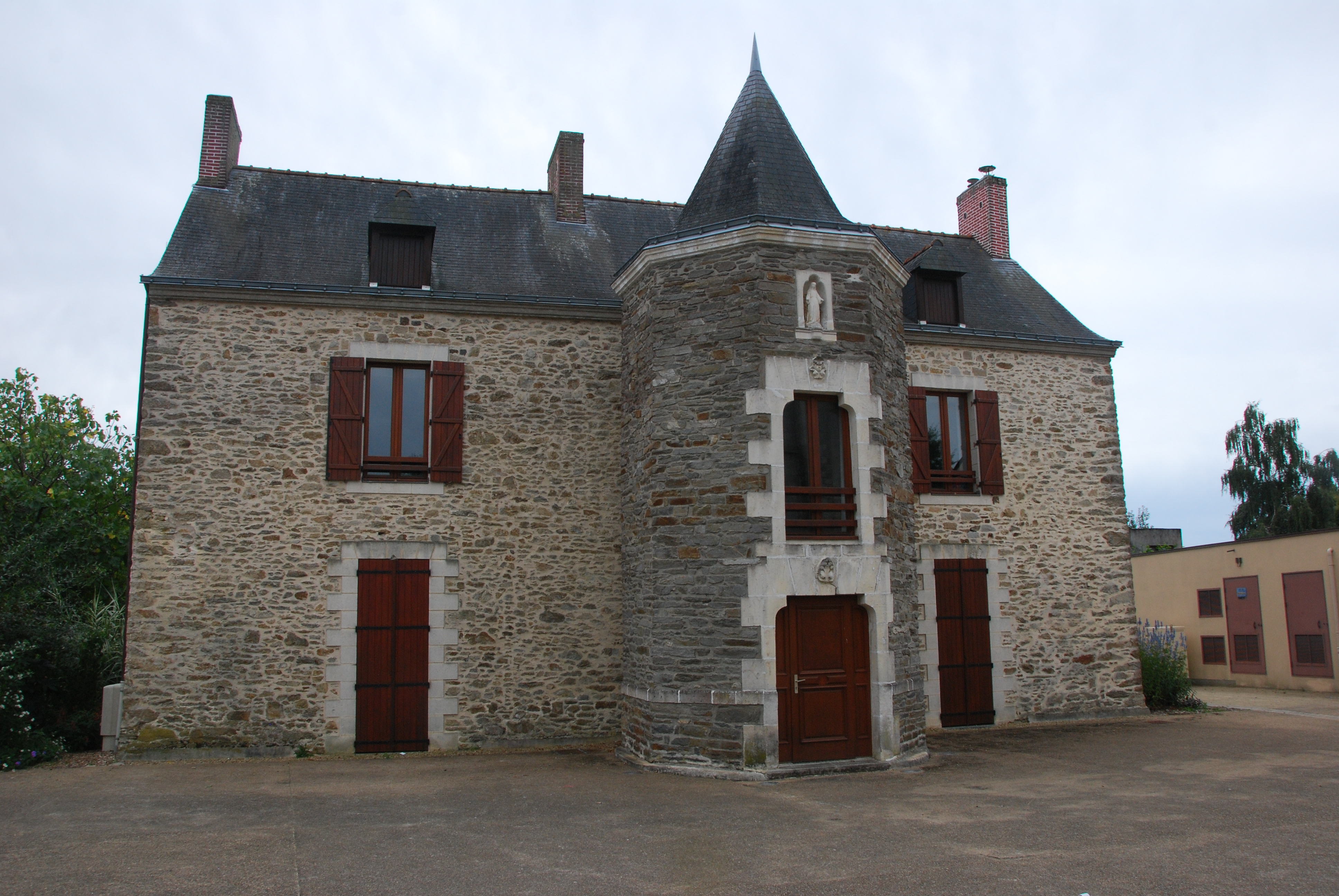 Médiathèque (ancien presbytère) de La Chapelle des Marais